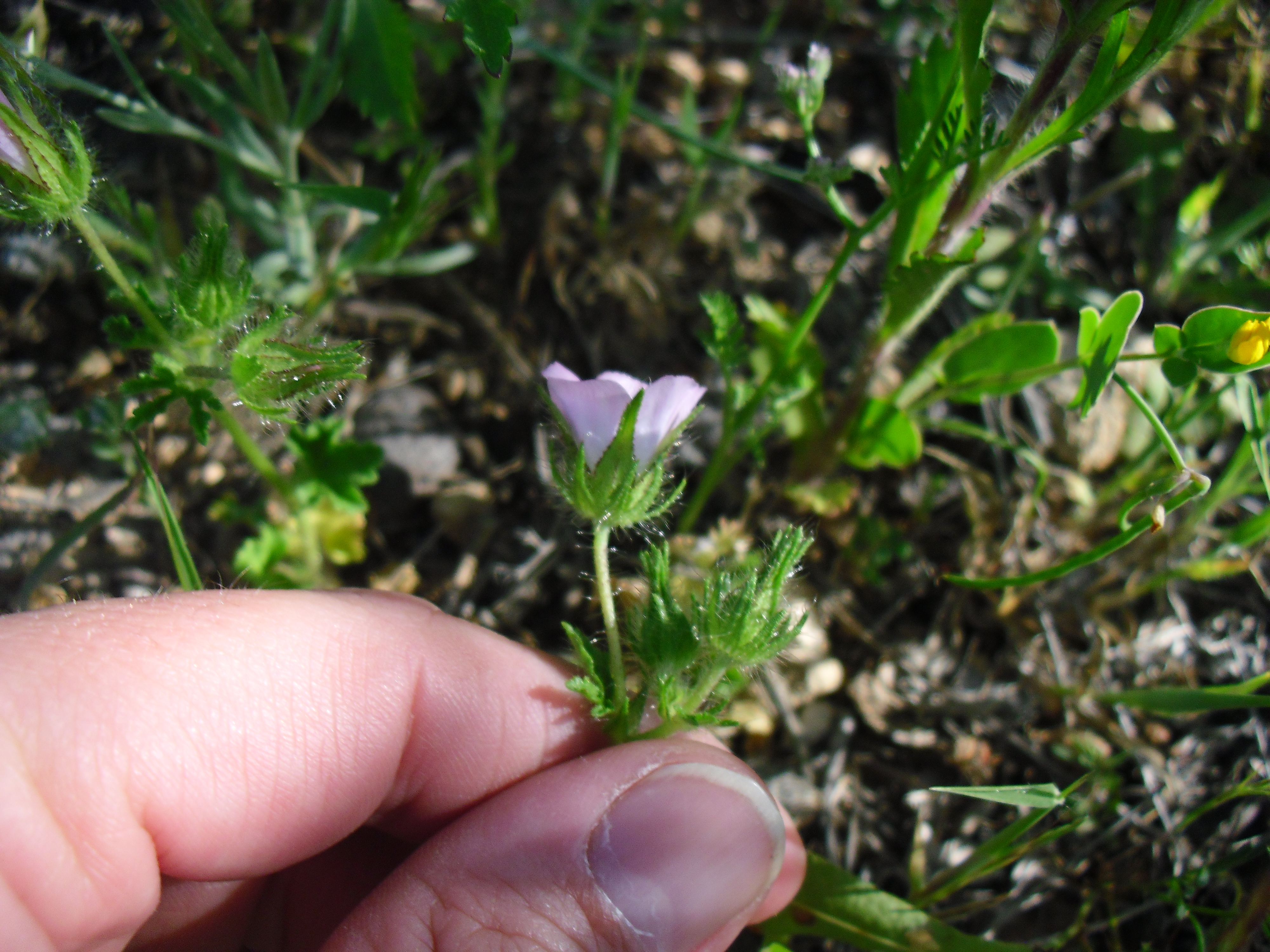 Vista lateral de la flor